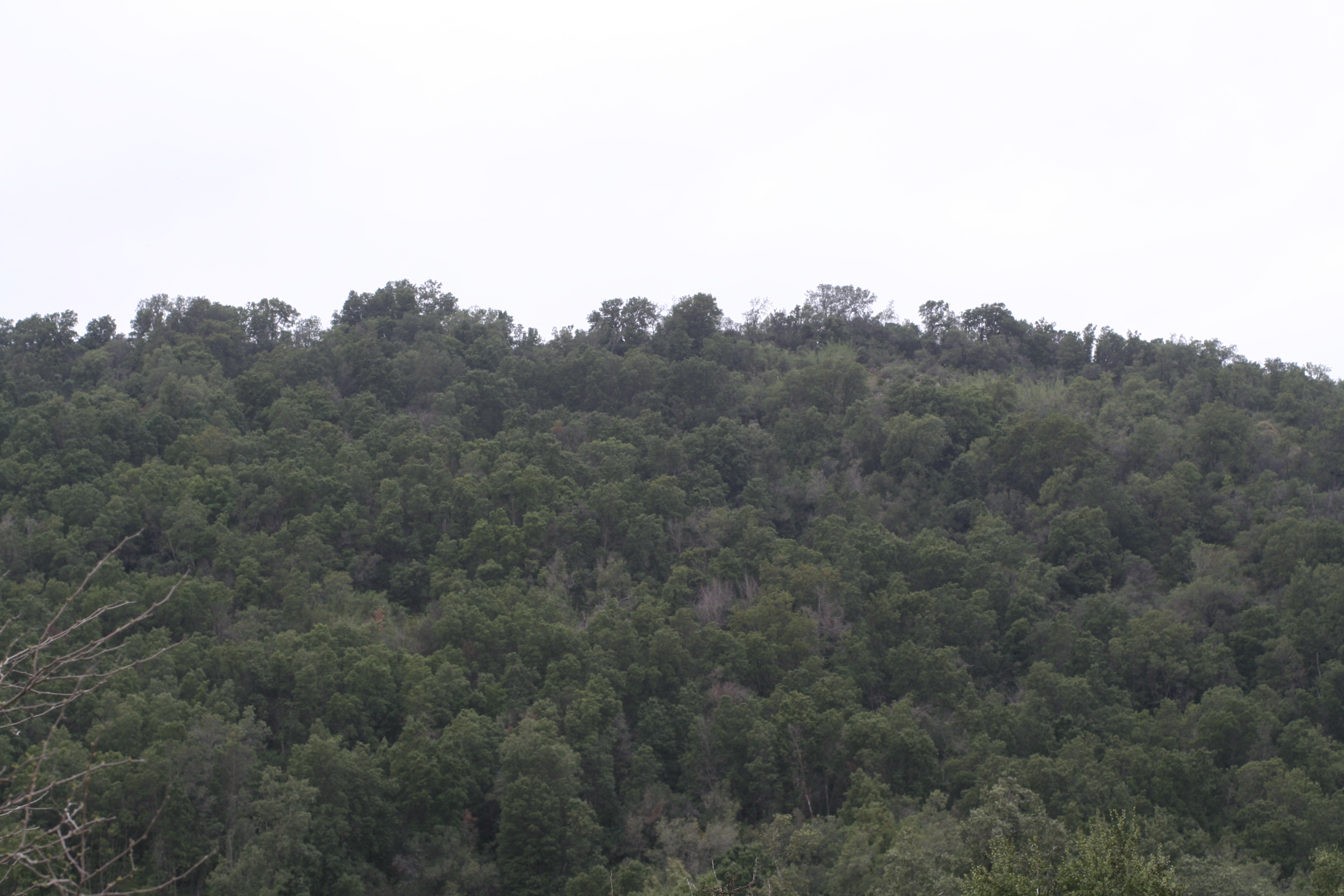 La imagen representa un aspecto del bosque esclerofilo de Chile central